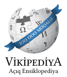 100 000 məqalə logo